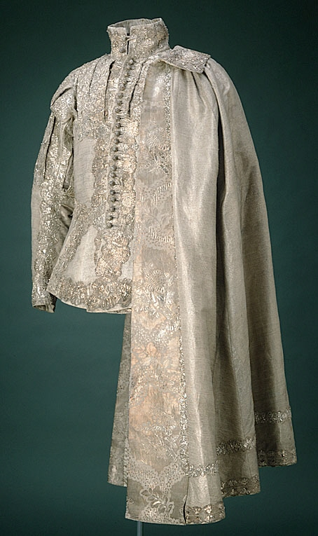 Fredrik Adolfs burgundiska dräkt, buren vid Gustav III:s kröning den 29 maj 1772. Jacka av slätt silvertyg, garnerad med silverspetsar. Knäppning mitt fram bestående av 24 knappar. Knapparna är av trä, höga och knoppformade, klädda med silvertråd. En ögla av en silversnodd sitter fästad över knappraden på vänster framstycke. Jackan har en ståndkrage, b. 80 mm. På vardera framstycke liksom på ryggstycket förekommer uppslitsade band med silverspets. Ärmarna är långa, med sprund i ärmsluten, l. 195 mm, kantade av en knäppning bestående av 11 knappar. Upptill är ärmarna uppslitsade och tyget därunder utgörs av silverbrokad, samma tyg som till Sofia Magdalenas brudklänning. Vid axlarna förekommer uppslitsade axelkarmar av silverspetsar. För fäste av manteln sitter på bakstycket nedanför axlarna två knappar klädda med silvertyg samt en knapp till höger nedanför kragen. Från midjan och ned bildas trapetsformade skörtkappor. Jackan är på insidan fodrad med vit taft. Sammanlagt förekommer det fyra linnehällor påsydda vid midjan. I Livrustkammarens samlingar, inventarienummer: 25552 (3527:a)